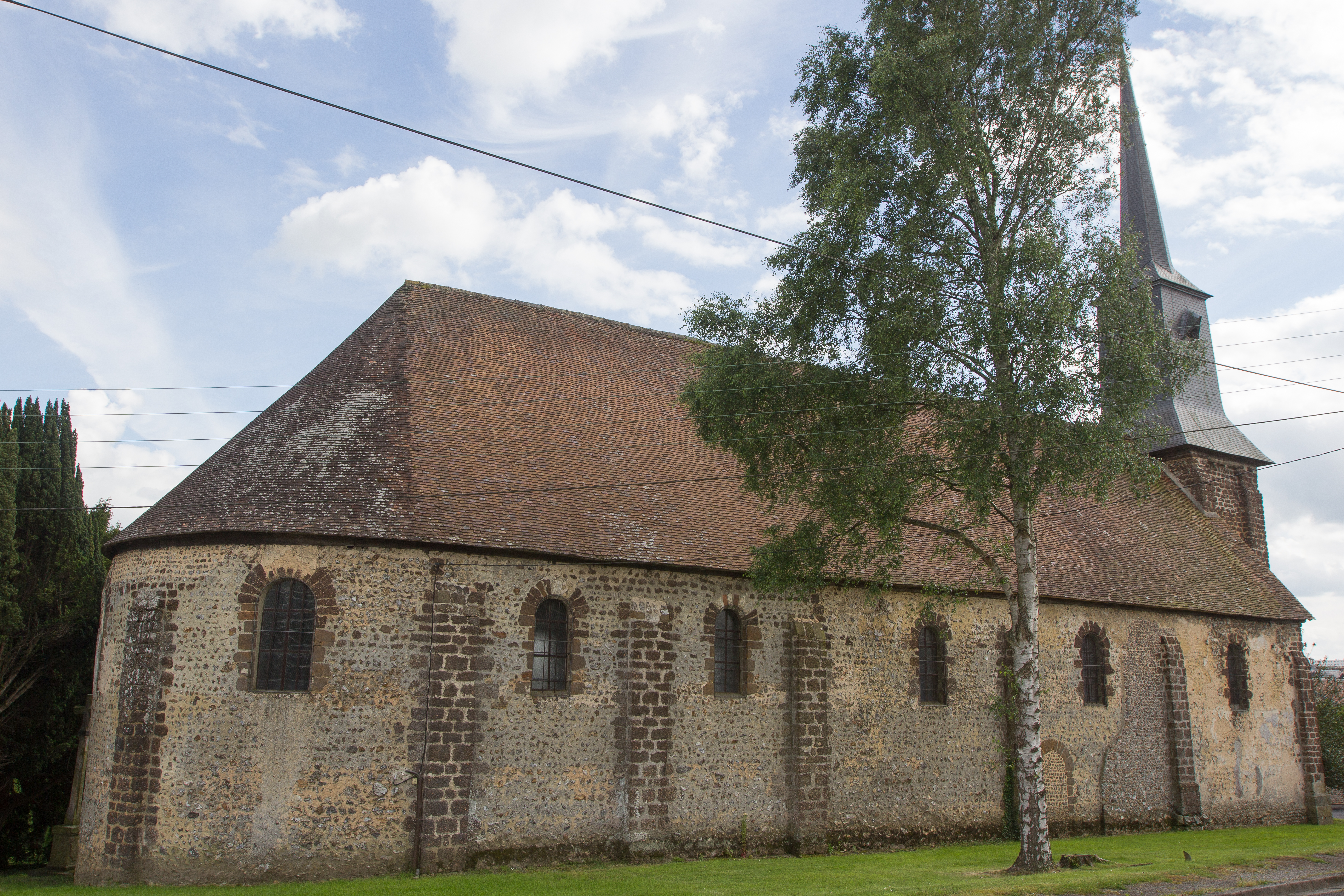 Église Saint-Barthélémy de L'Aigle (Eure, Normandie, France)